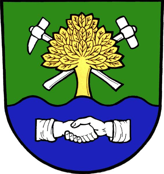 Znak obce Stará Ves (okres Bruntál)